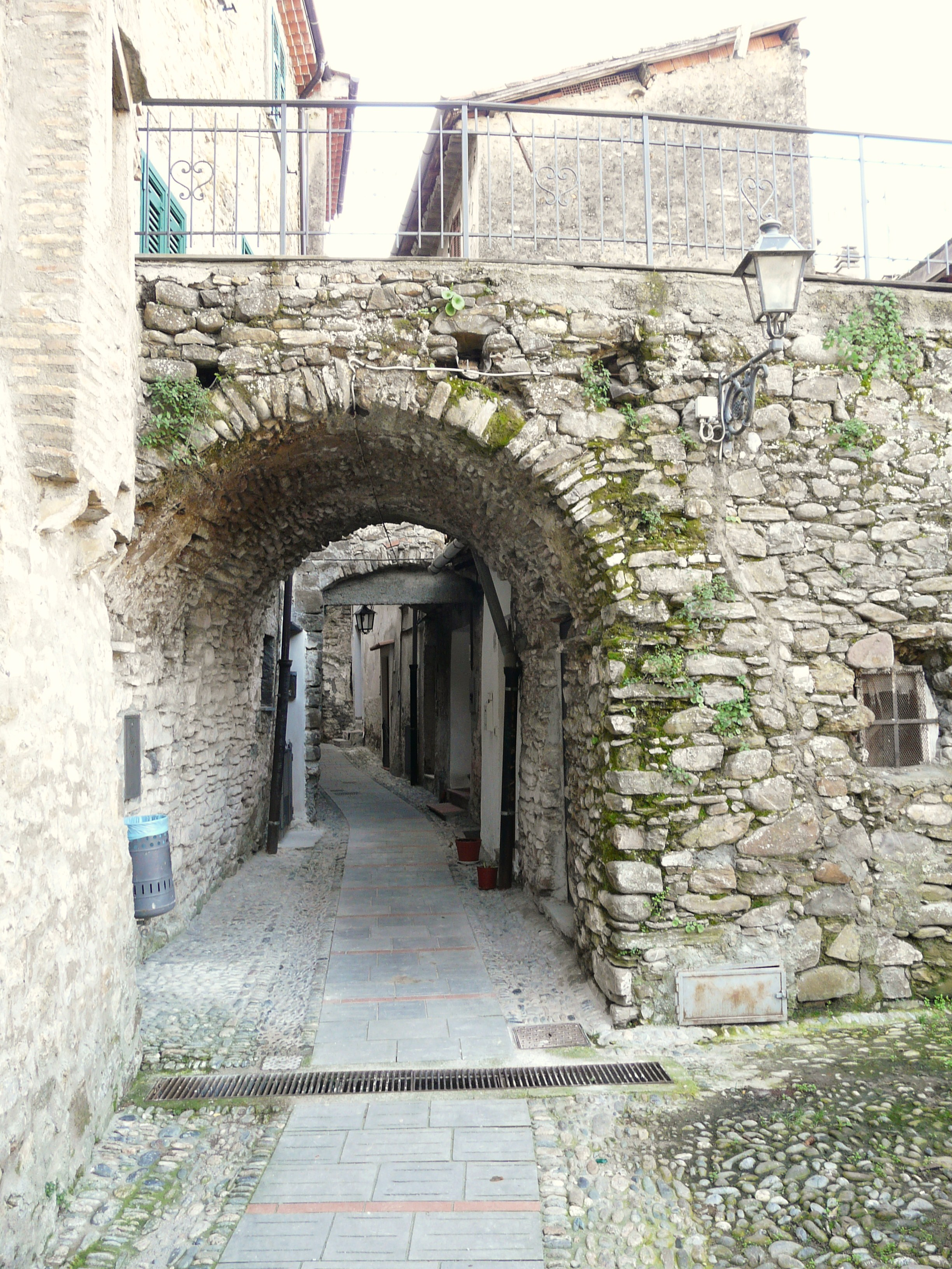 Vallecrosia Alta, Vallecrosia, Liguria, Italia